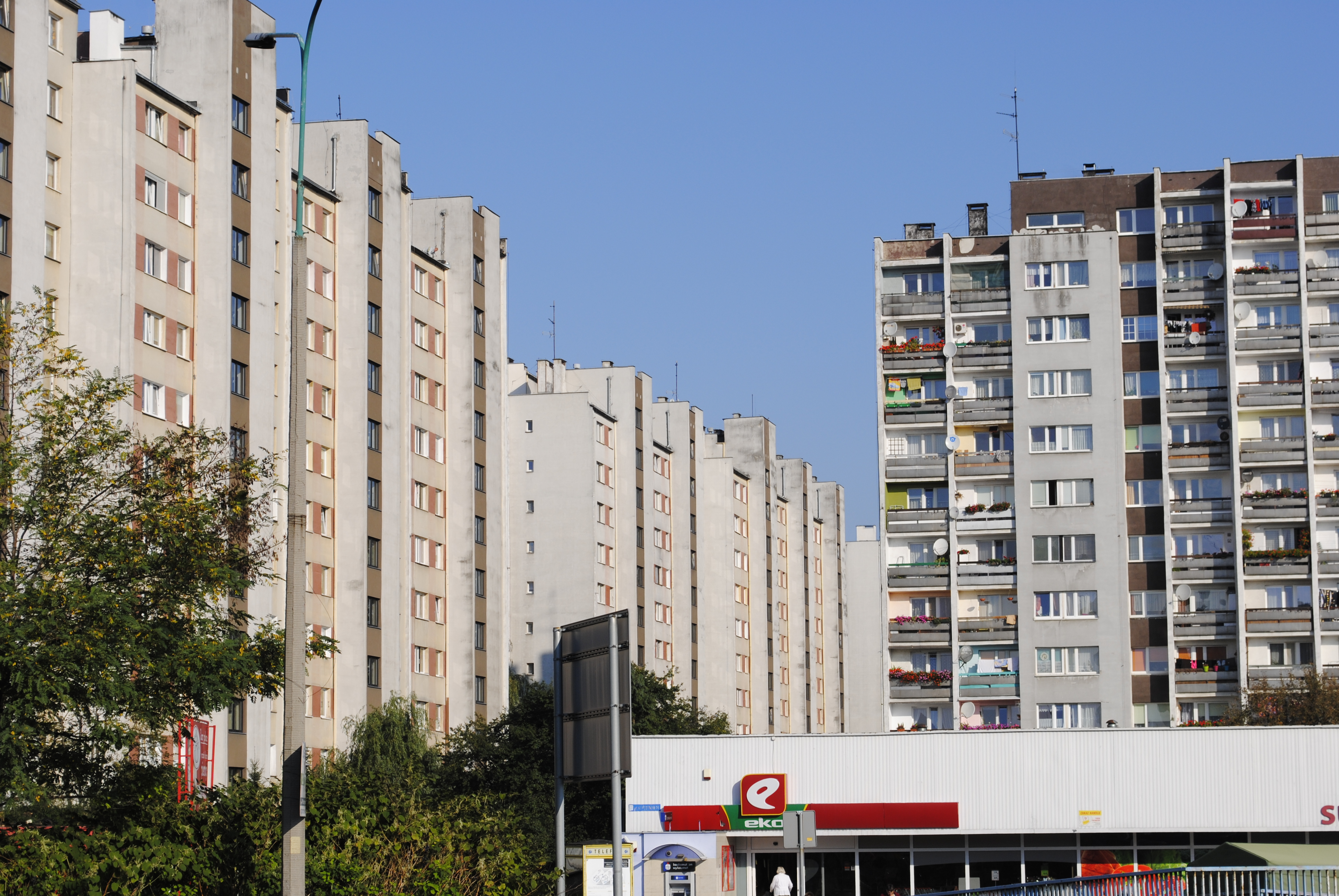 Der Oppelner Stadtteil Zaodrze (dt. Odervorstadt), Wohnblöcke an der Ul. Niemodlinska (Falkenbergstraße)